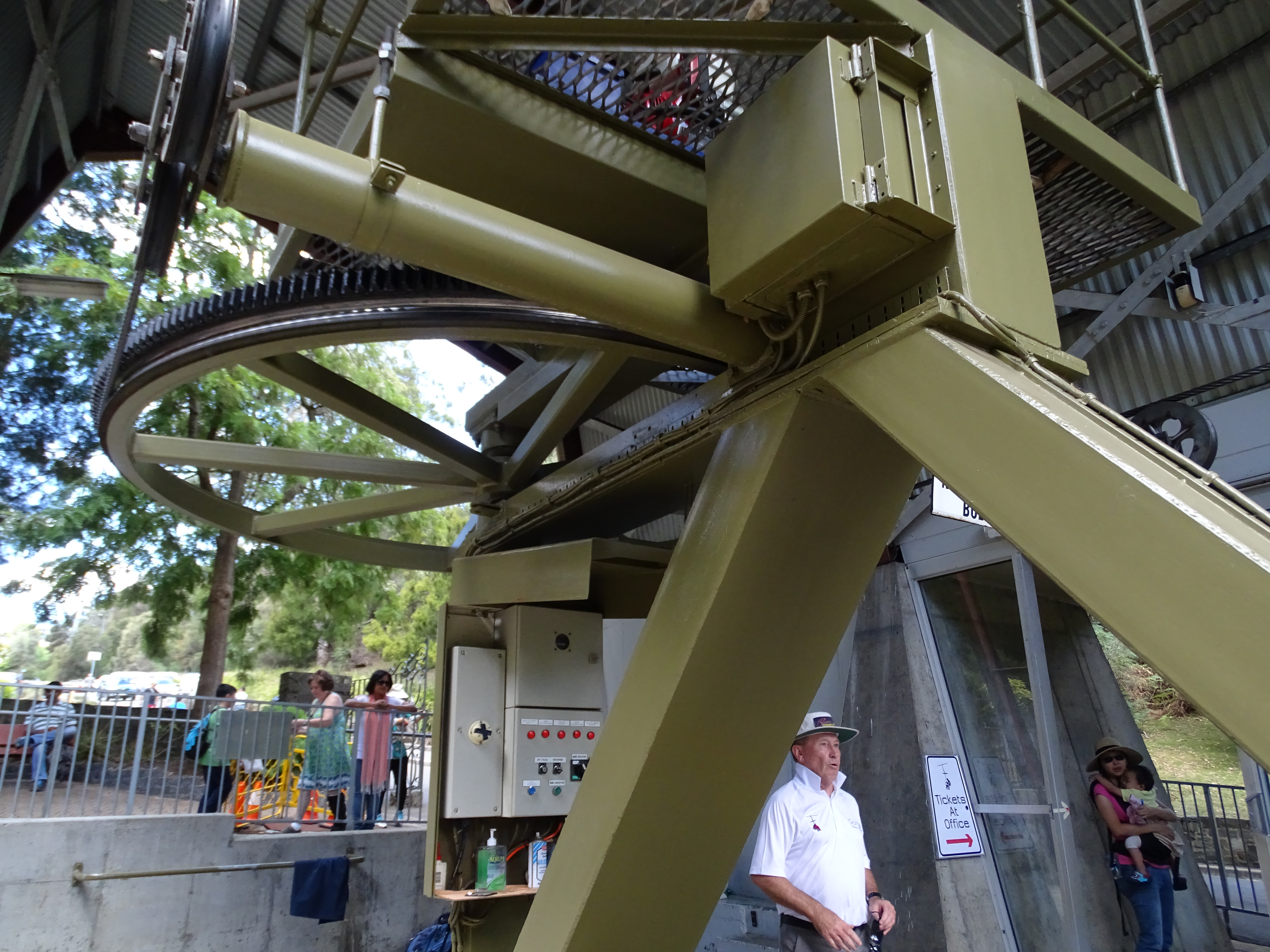 Cataract Gorge, Laquceston / Tasmanien, Australien; Antrieb des Sessellifts